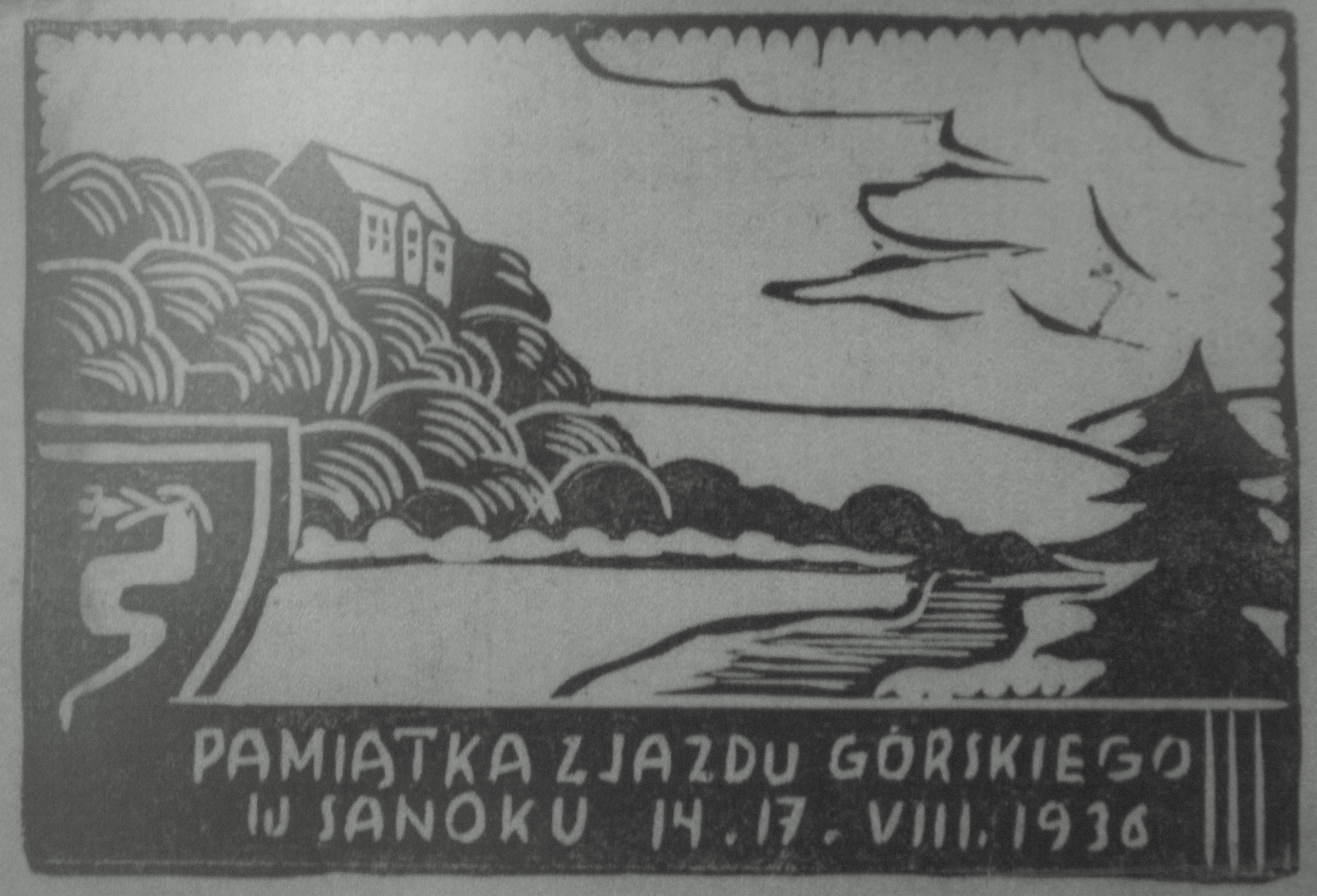 Pamiątka Zjazdu Górskiego w Sanoku (1936).